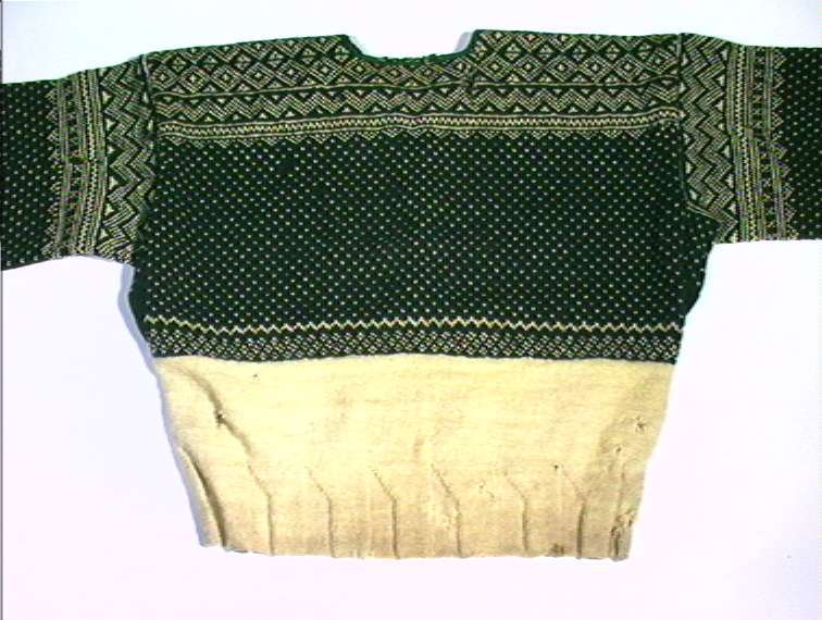 Lusekofte brukt i Bykle i Setesdal, Aust-Agder. Innkjøpt av Norsk Folkemuseum i 1911.